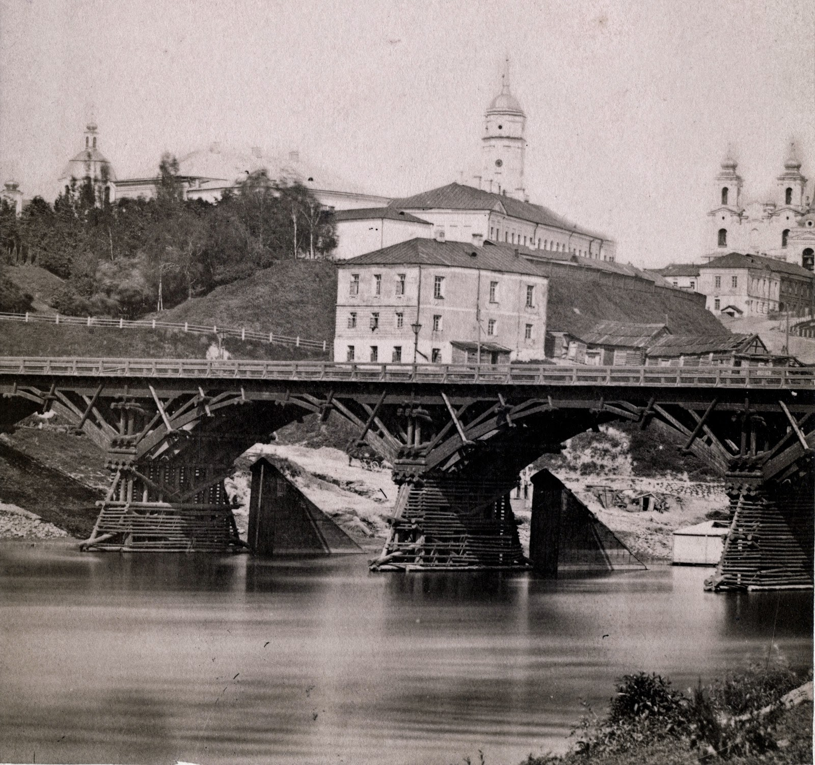 Беларуская (тарашкевіца): Магілёў (Mahiloŭ), Дняпро (Dniapro)